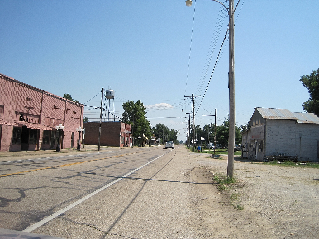 Black Oak, Arkansas